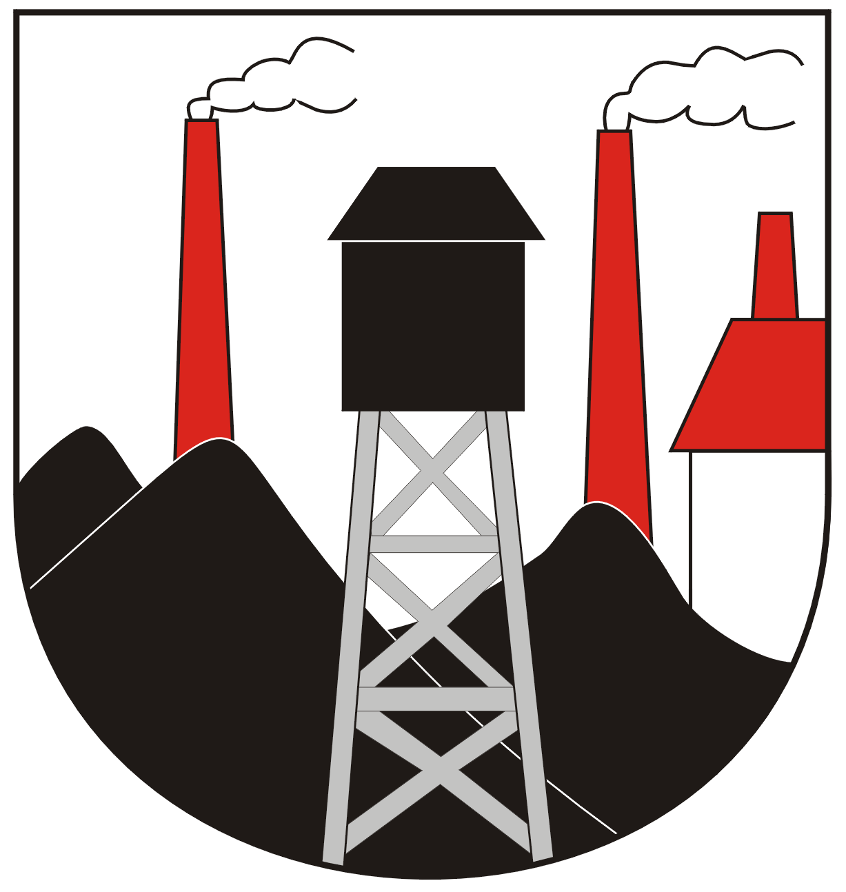 Old coat of arms of Łaziska Średnie (Mittel Lazisk), part of Łaziska Górne city (Ober Lazisk) Stary herb Łazisk Średnich - wersja kolorowa na podstawie M. Gumowskiego - Herby i pieczęcie województwa śląskiego, Katowice 1939